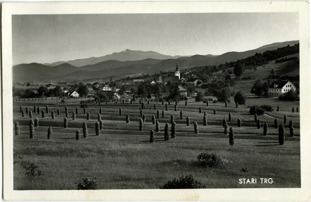 Razglednica Starega trga pri Ložu.